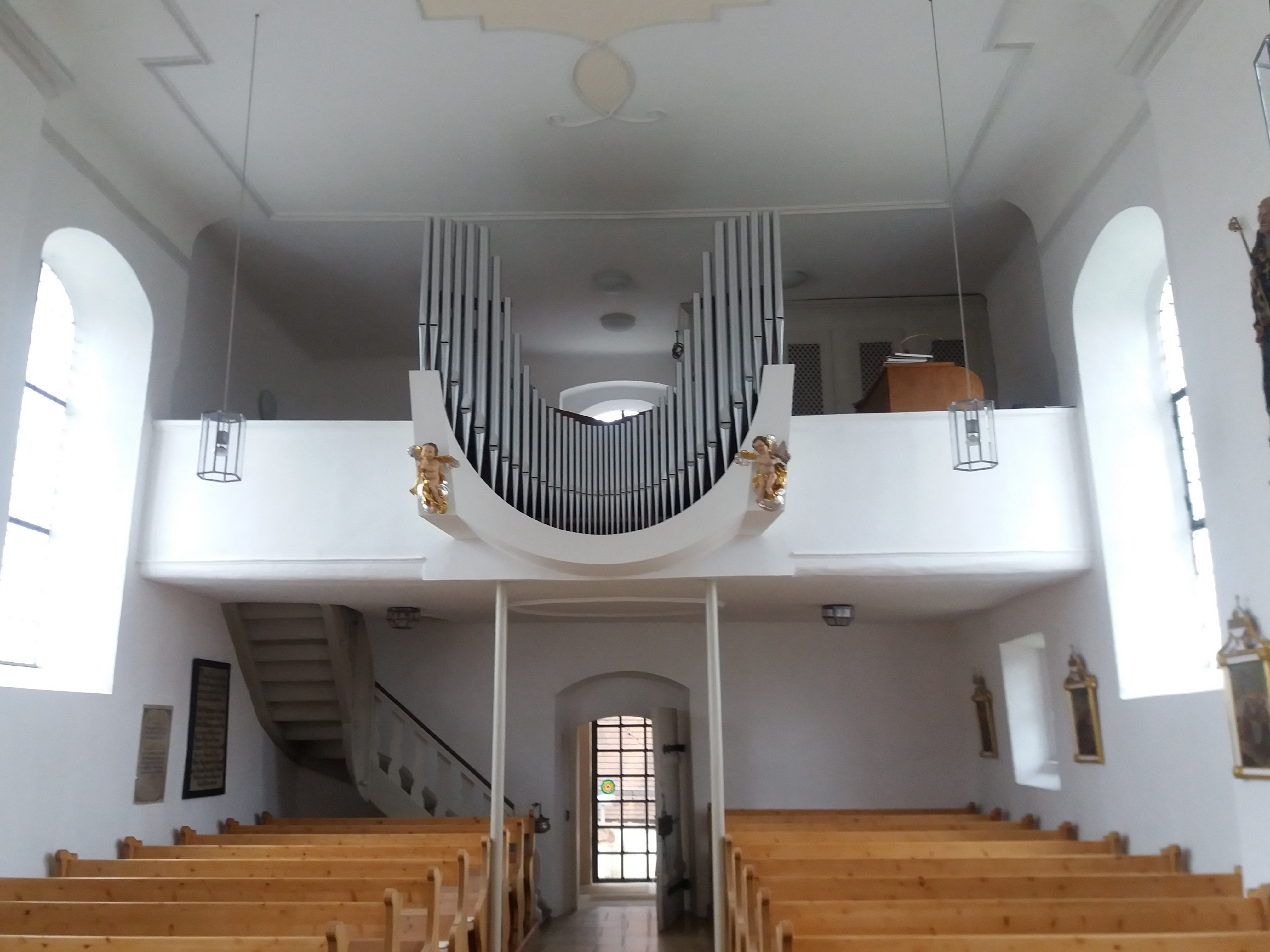 Orgel der Gebrüder Sandtner in der katholischen Pfarrkirche St. Mammas in Finningen (Stadtteil von Neu-Ulm). Gebaut in den 1950er Jahren.